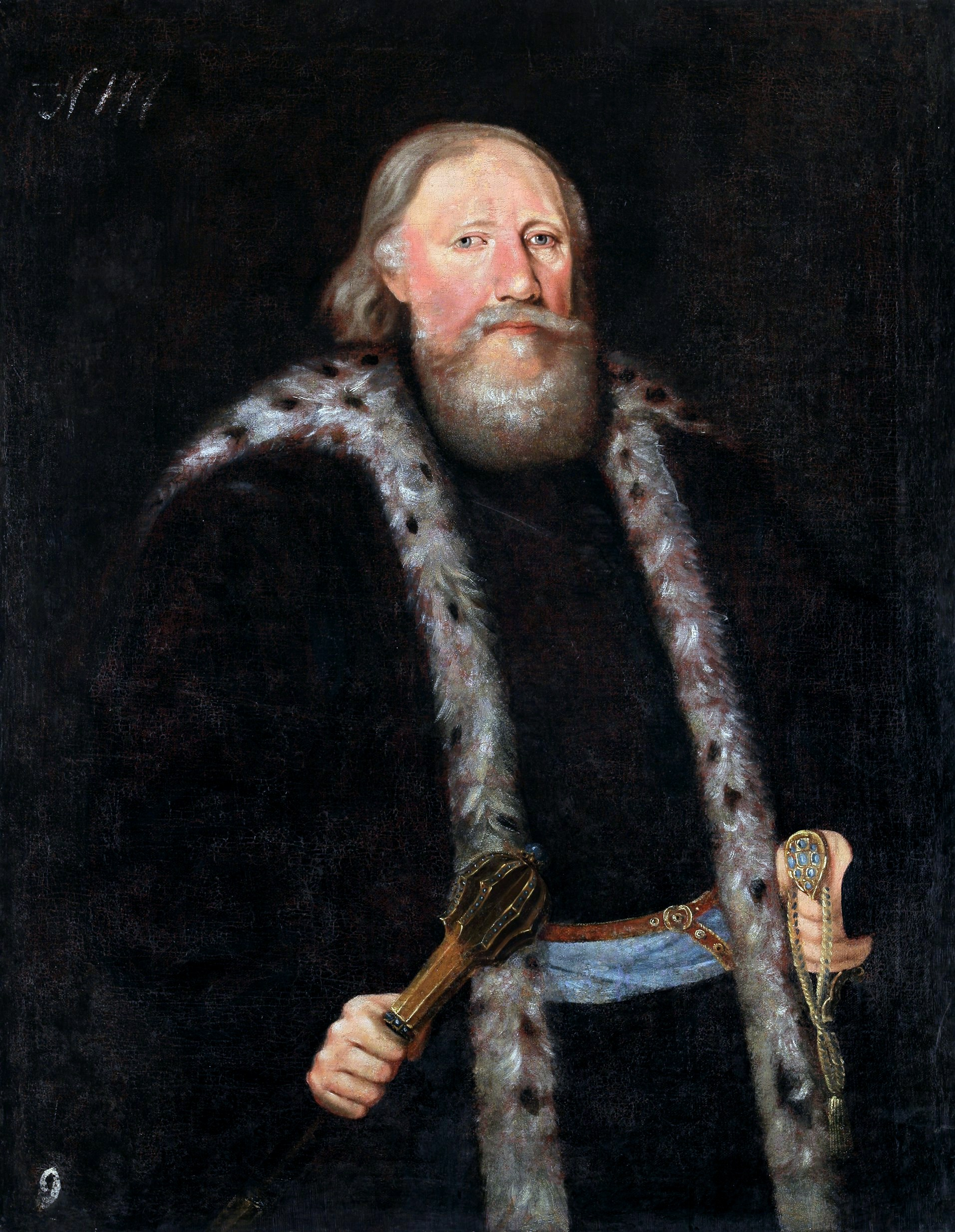 Беларуская (тарашкевіца): Партрэт Мікалая Радзівіла Старога (Mikałaj Radzivił Stary)